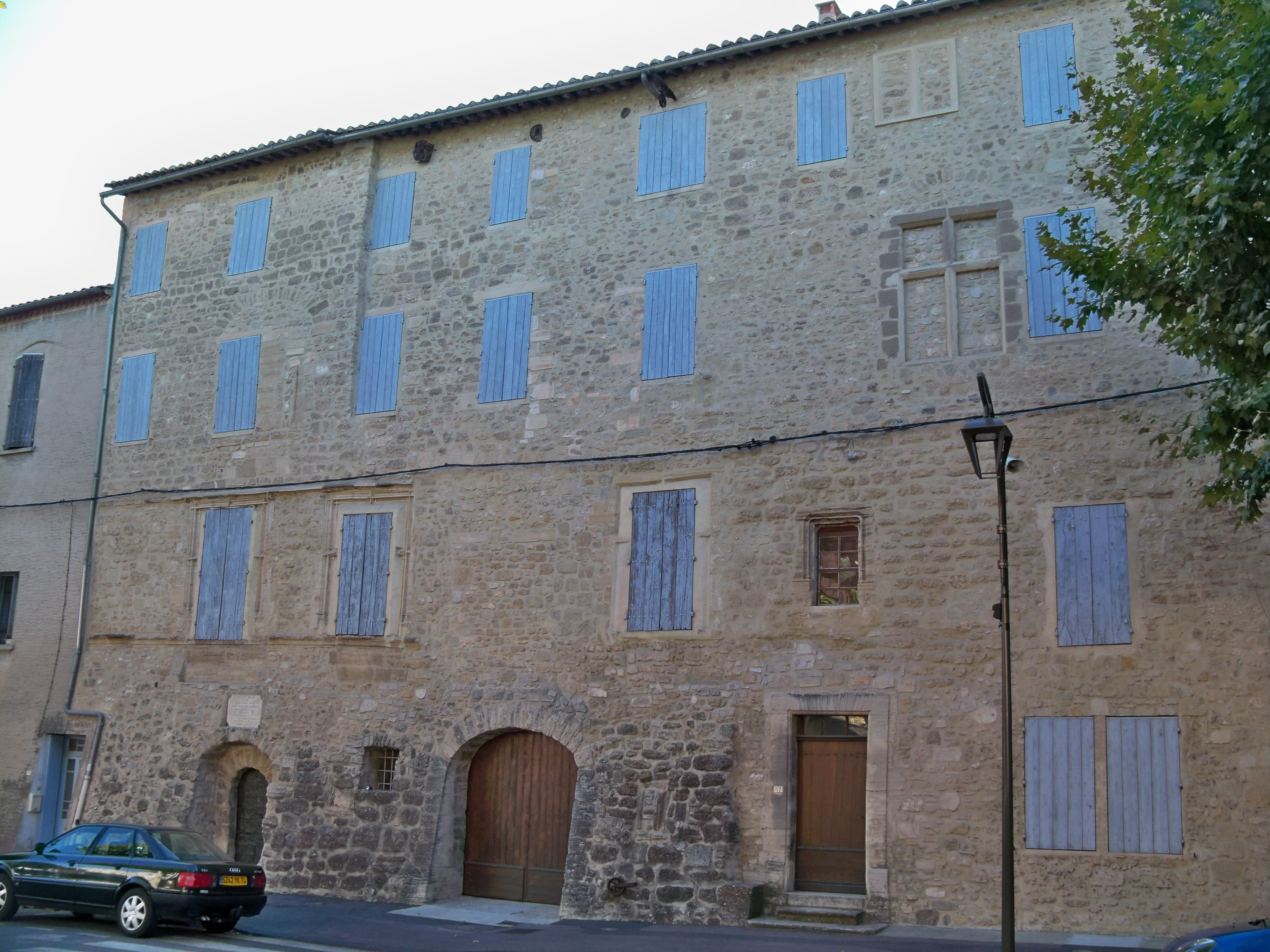 Chateau des Astoaud puis des Causans de Mazan (84)